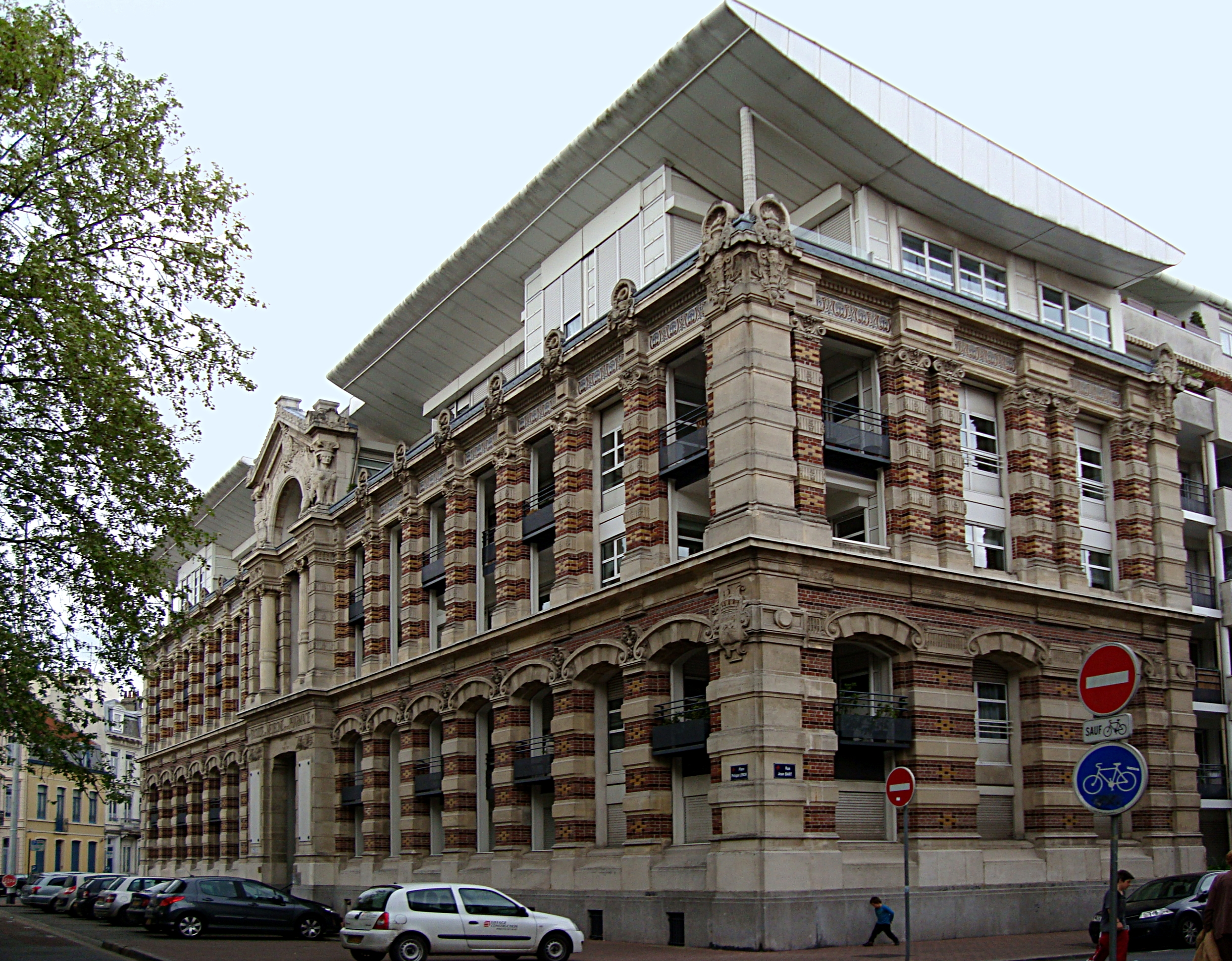 Université de Lille : Les locaux de l'ancienne faculté de Médecine et de Pharmacie de Lille (Nord) à l’angle de la rue Jean Bart et de la rue de Valmy, face à la place Philippe Lebon. Les travaux, confiés à l’architecte Carlos Batteur, se sont déroulés de 1876 à 1892. Abandonnés en 1954, ils accueillent aujourd'hui le Centre de documentation pédagogique (CRDP) de Lille.